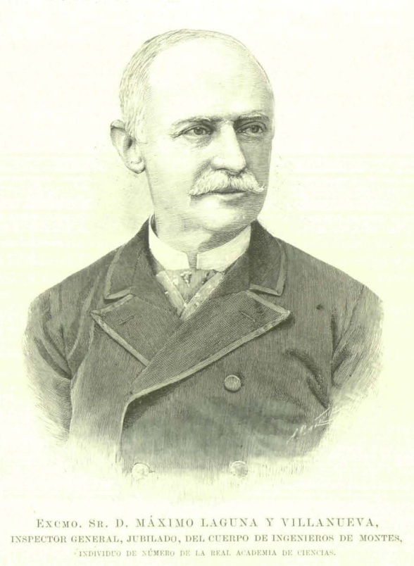 Excmo. Sr. D. Máximo Laguna y Villanueva, inspector general, jubilado, del cuerpo de ingenieros de montes,, individuo de número de la real academia de Ciencias.